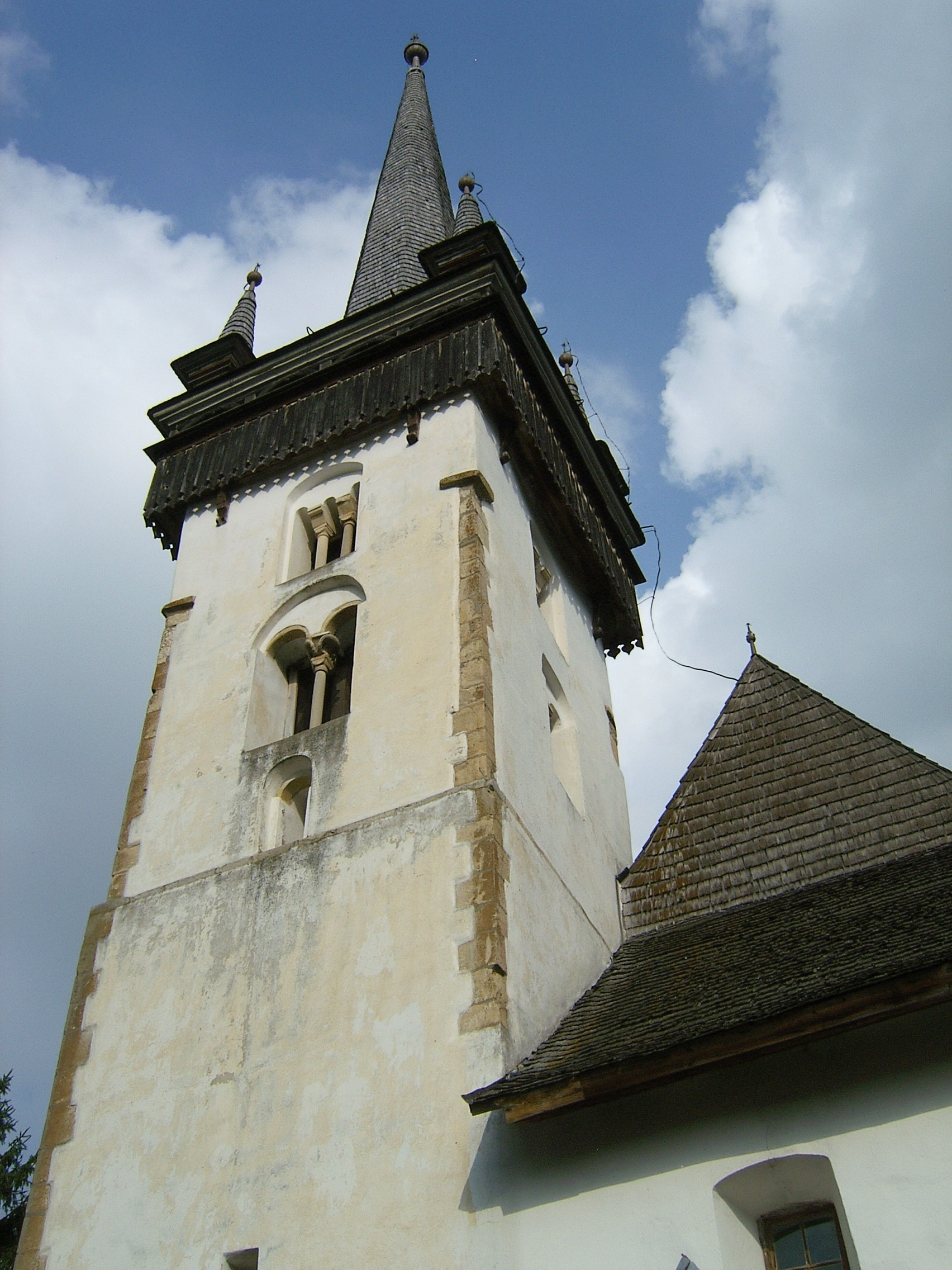 A magyargyerőmonostori református templom tornya (Erdély)